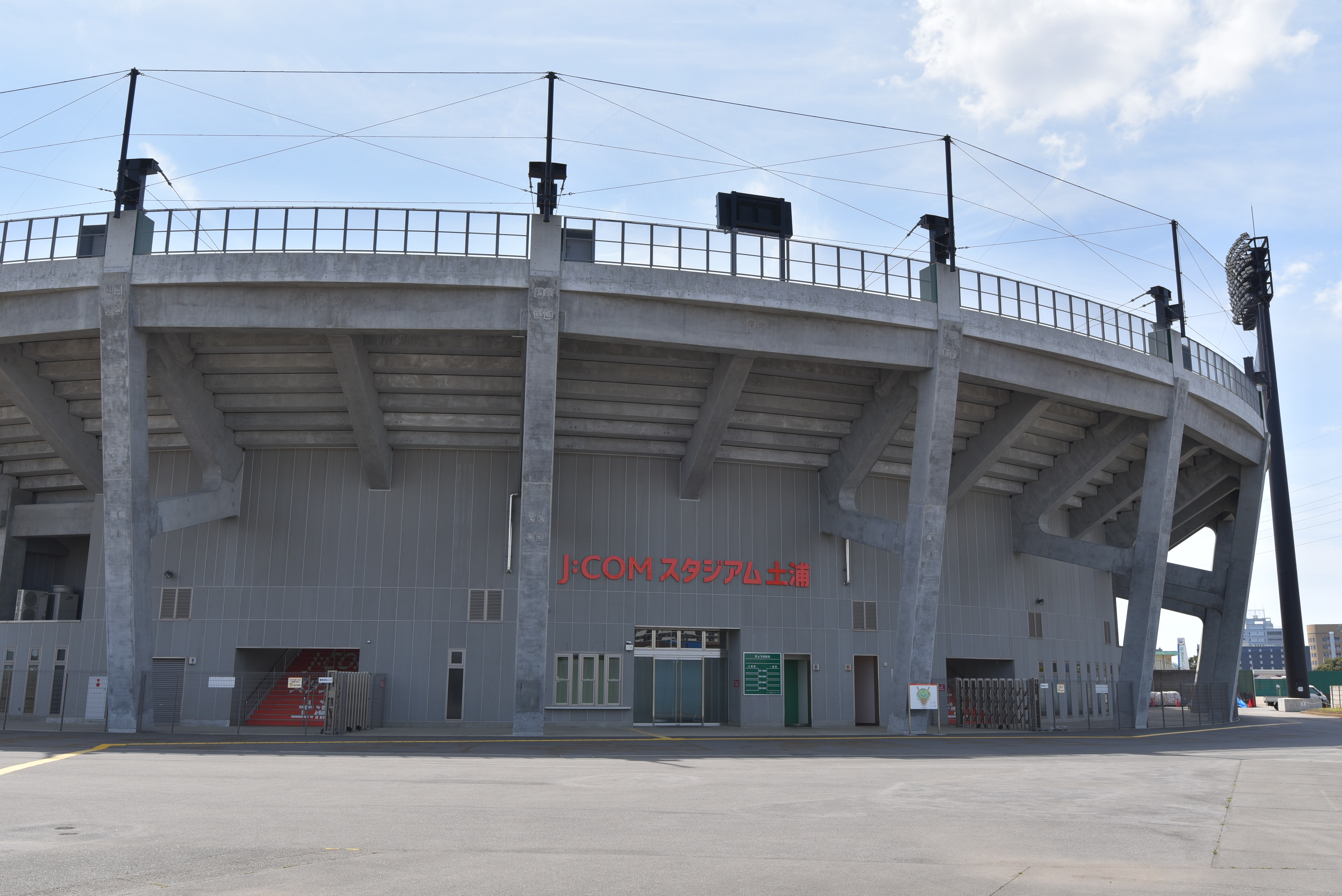 茨城県土浦市の所在する川口運動公園の野球場（土浦市営球場）。施設命名権により、「J:COMスタジアム土浦」と名付けられている。